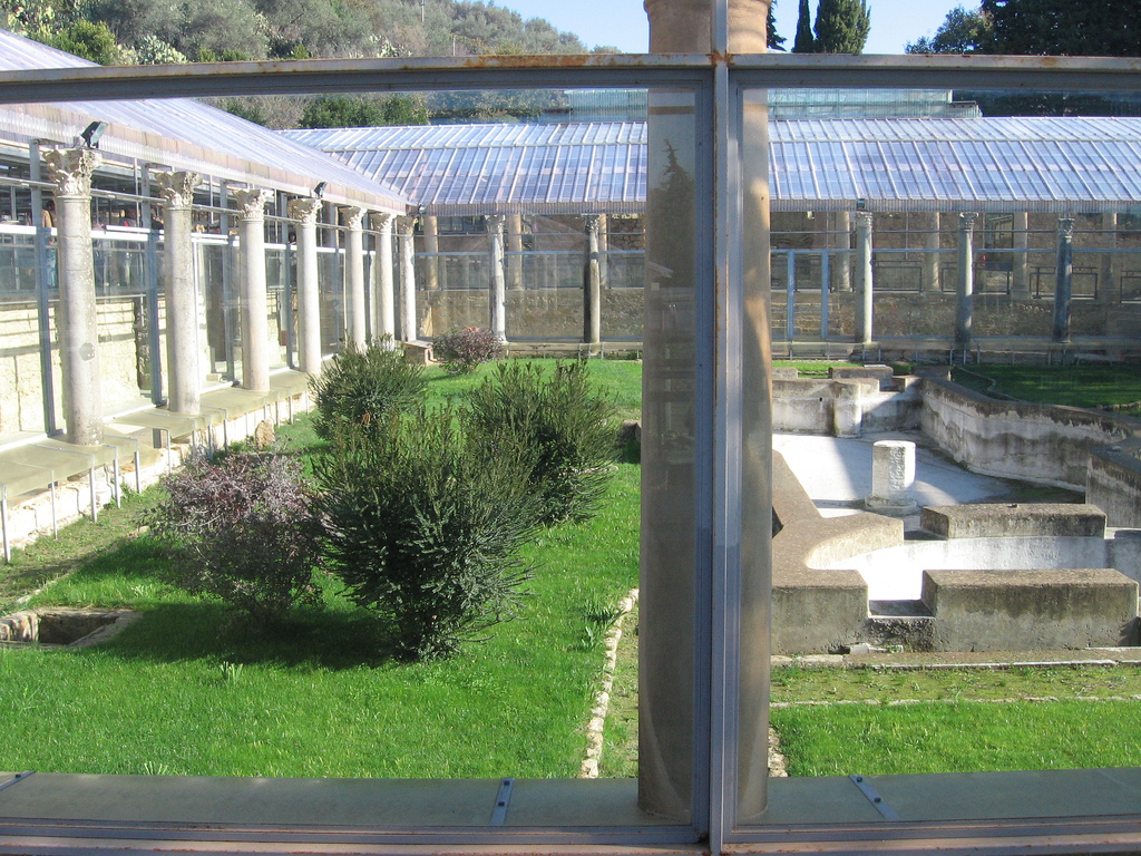 Villa Romana del Casale, Piazza Armerina, Sicily/Sicilia, Italy/Italien